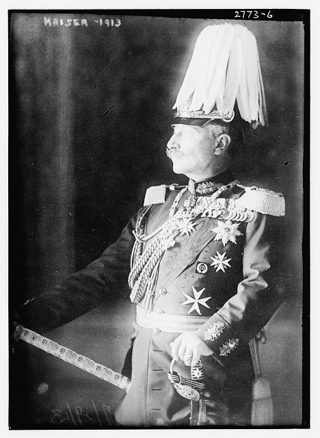 Wilhelm II